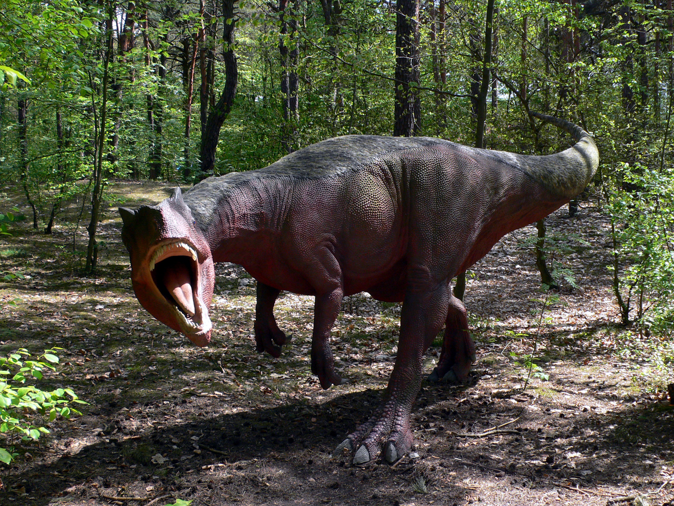 JuraPark, Solec Kujawski.